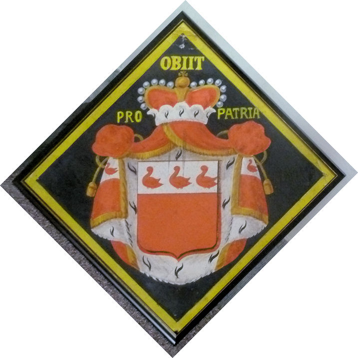 OBBIT PRAENOBILIS dom Wolfgang d'VRSEL, natus 08/09/1882 obbit Budingen 18/08/1914